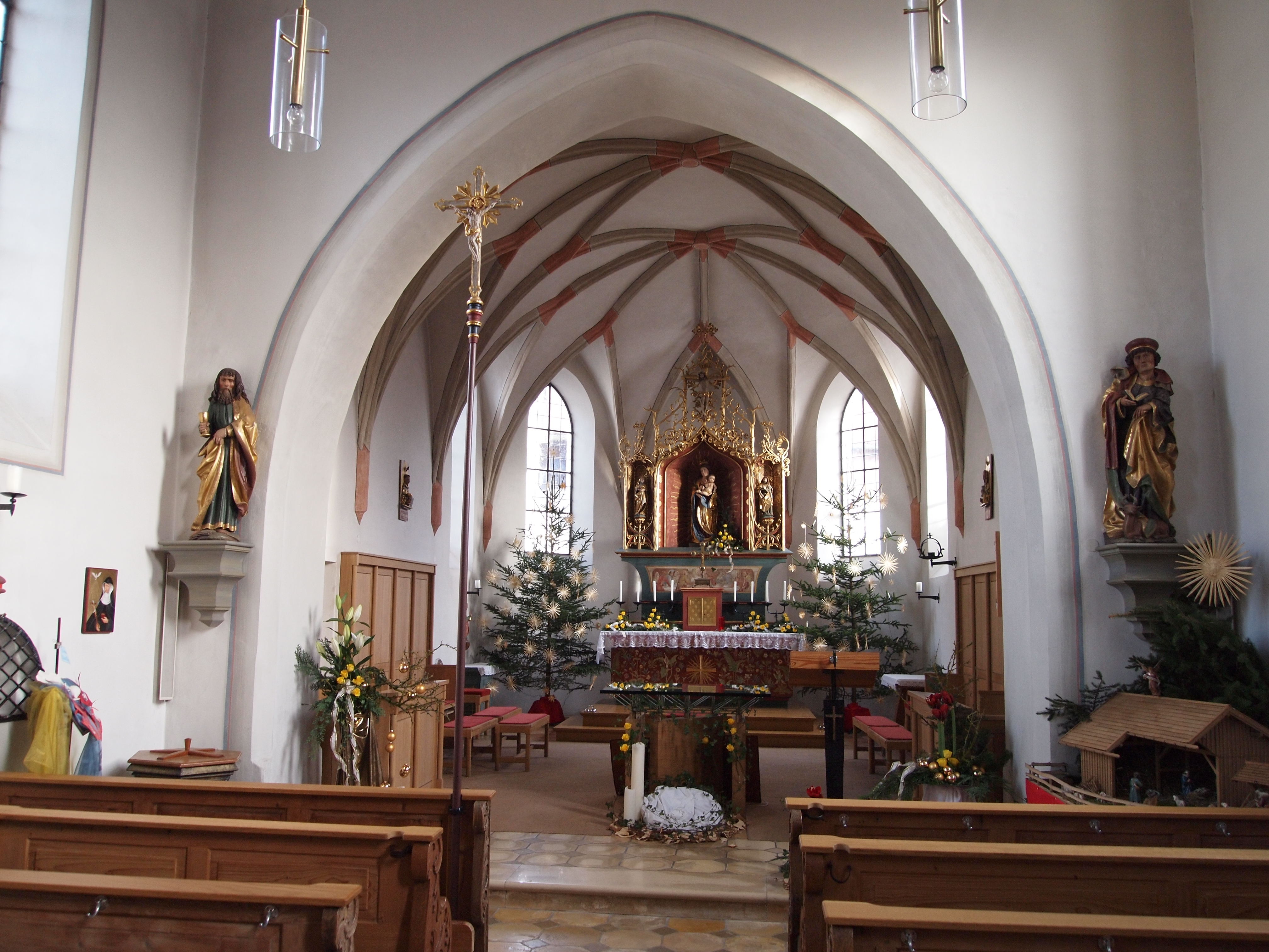 Pfarrkirche St. Thomas, Hirschzell, Chor mit Kreuzgewölbe, Volks- und Hochaltar